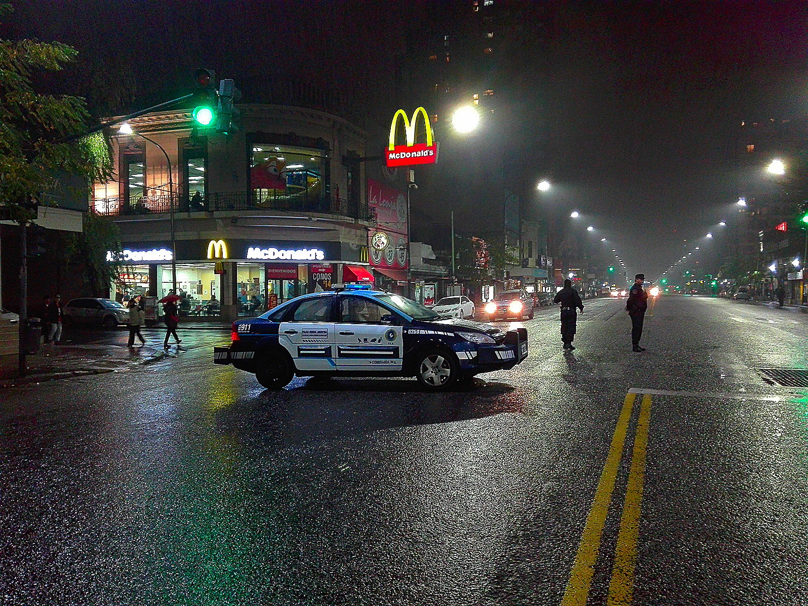 Móvil de la Policía Federal Argentina cortando el tránsito sobre la Av. Rivadavia esquina Lafuente, Ciudad de Buenos Aires, Argentina. La Av. Rivadavia es la principal arteria de esta ciudad. A escasos cien metros, manifestantes reclamaban por los aumentos de tarifas implementados por el gobierno argentino. 14 de julio de 2016.